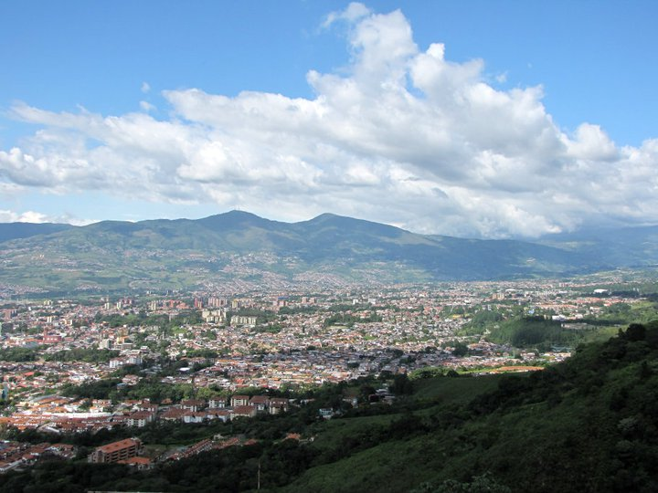 San Cristóbal, estado Táchira - Venezuela (2006)